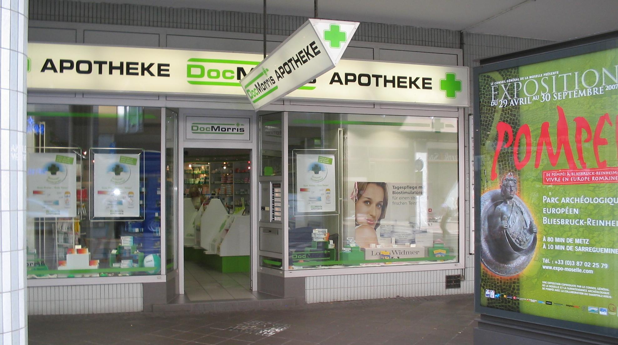 Versandapotheke "Doc Morris" in Saarbrücken (Kaiserstraße)